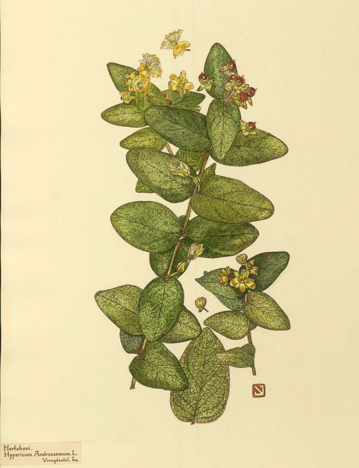 Hypericum androsaemum Linnaeus